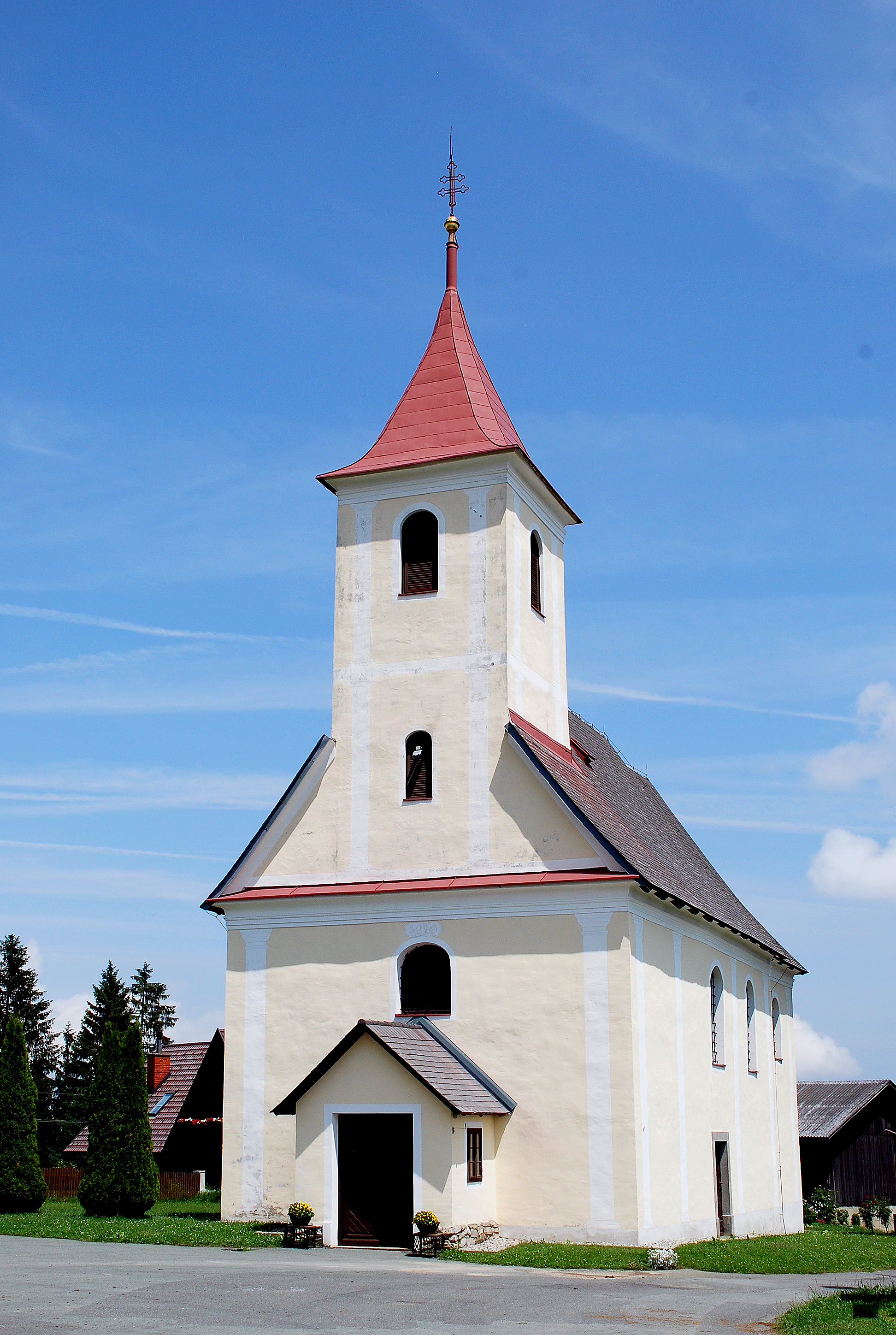 Aibl, Steiermark, Österreich: Kirche St. Lorenzen